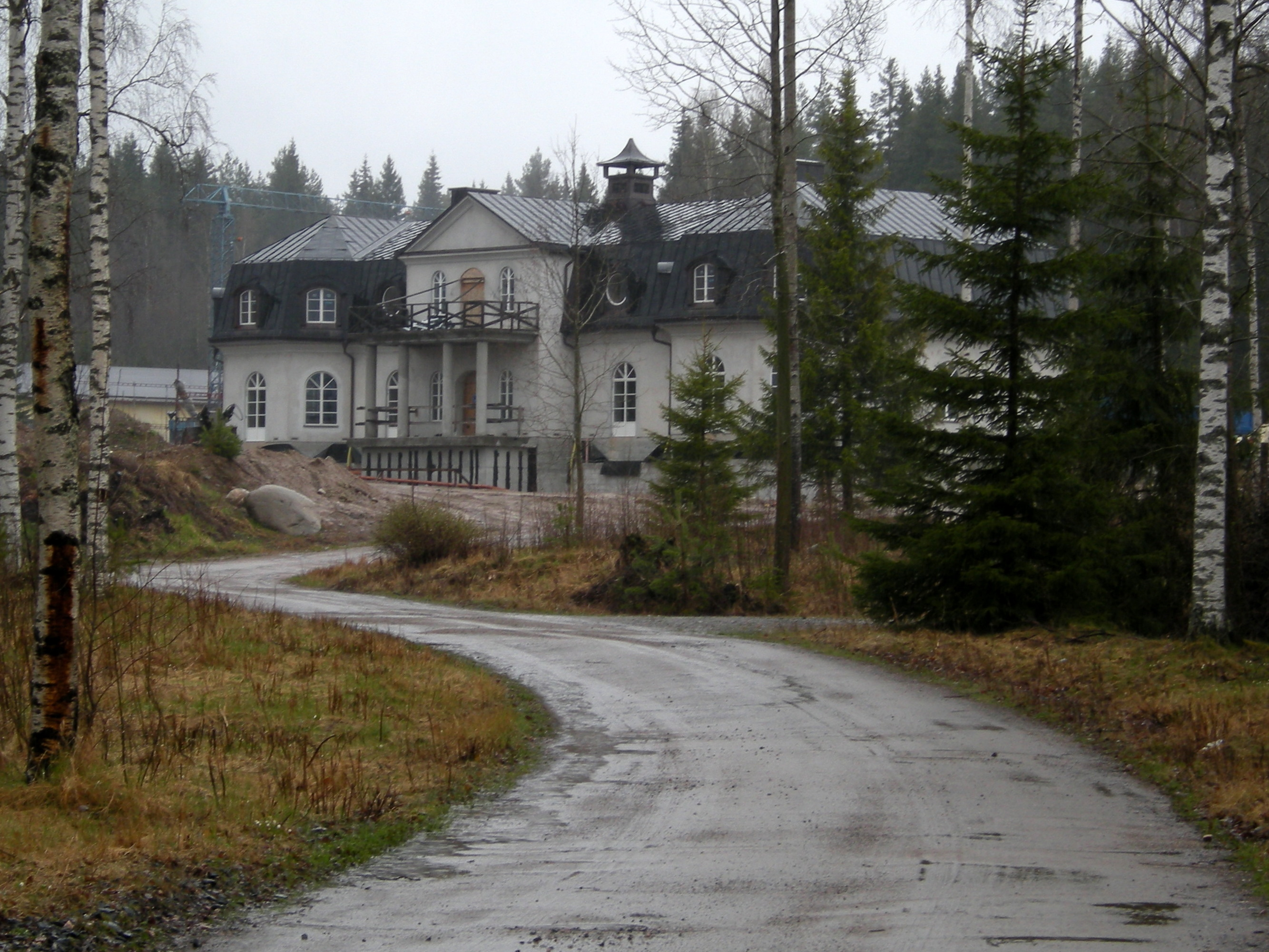 Persbo slott tillhörigt Lars-Erik Magnusson. Norr Ludvika.